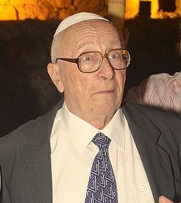 משה סמט.